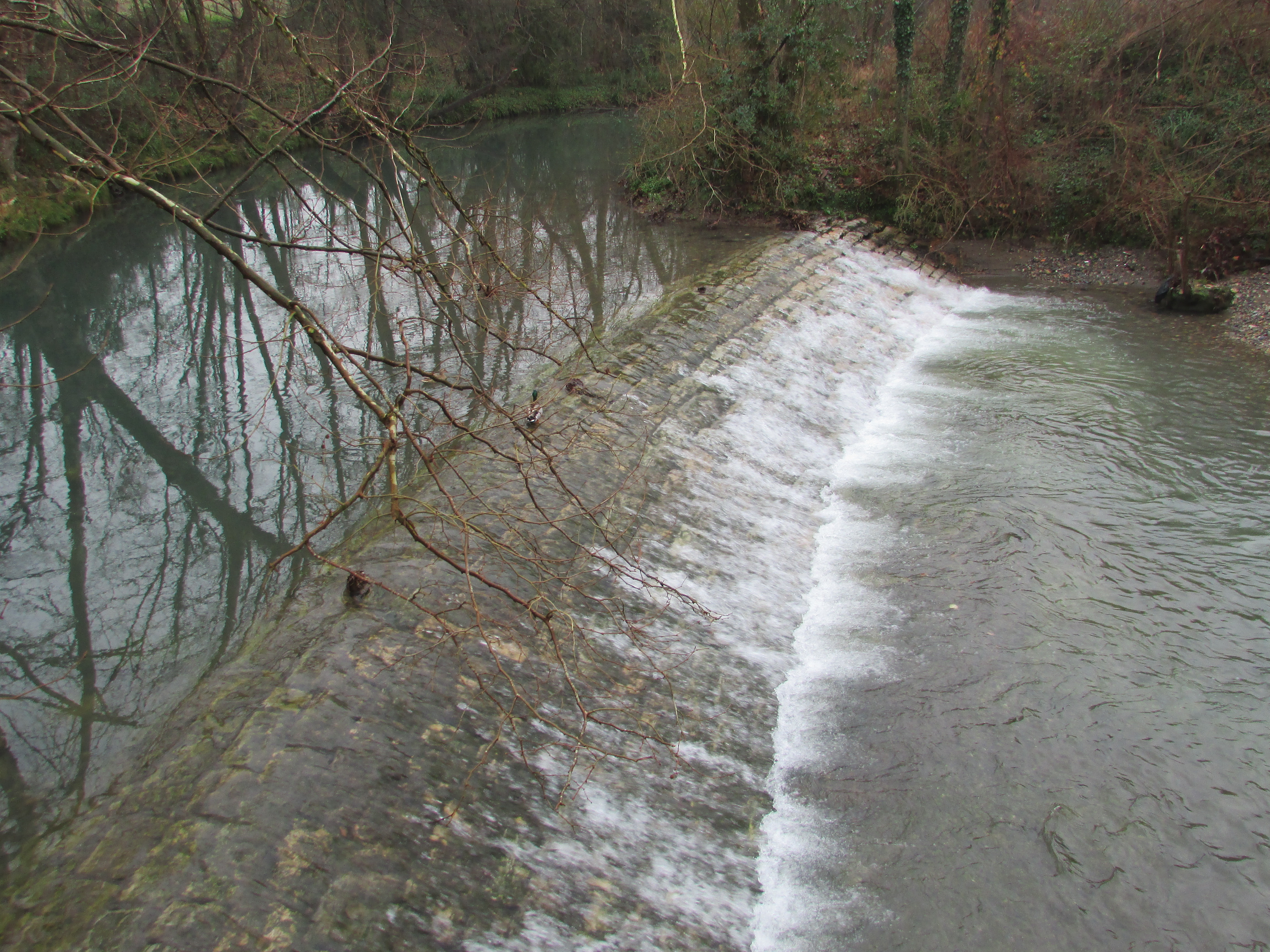 Yurrita presak egurrezko egitura du barnekaldean eta 1,22 metrotako altuera ibai hondoarekiko